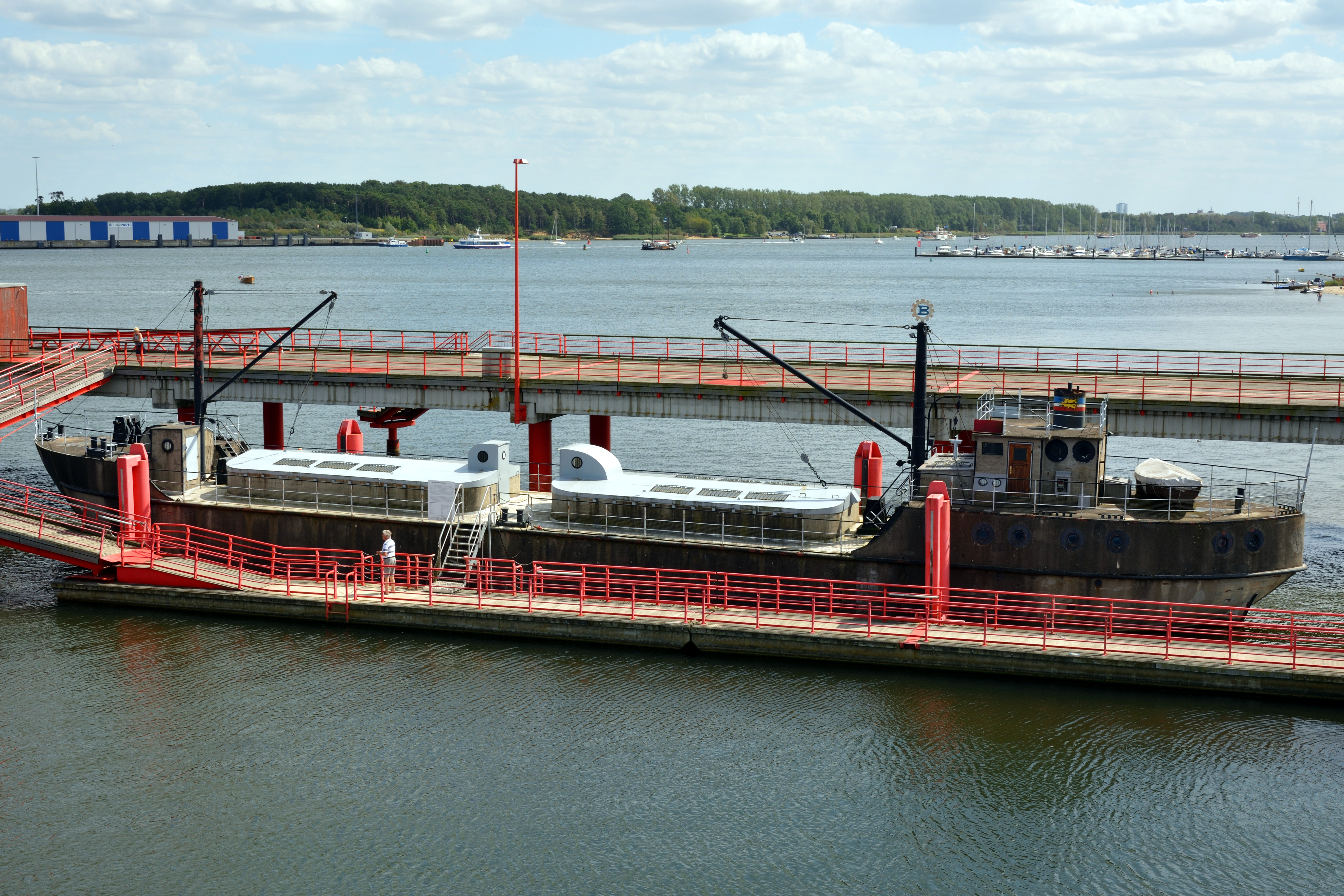 Das Betonschiff "Capella" als Museumsschiff in Rostock.